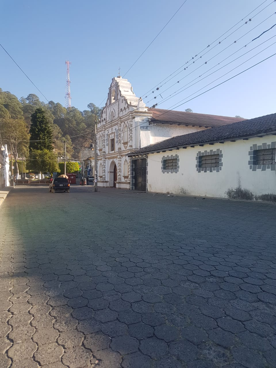 calles Principales de la Iglesia Católica de Malacatancito, fotografía tomada el 27 de febrero de 2019